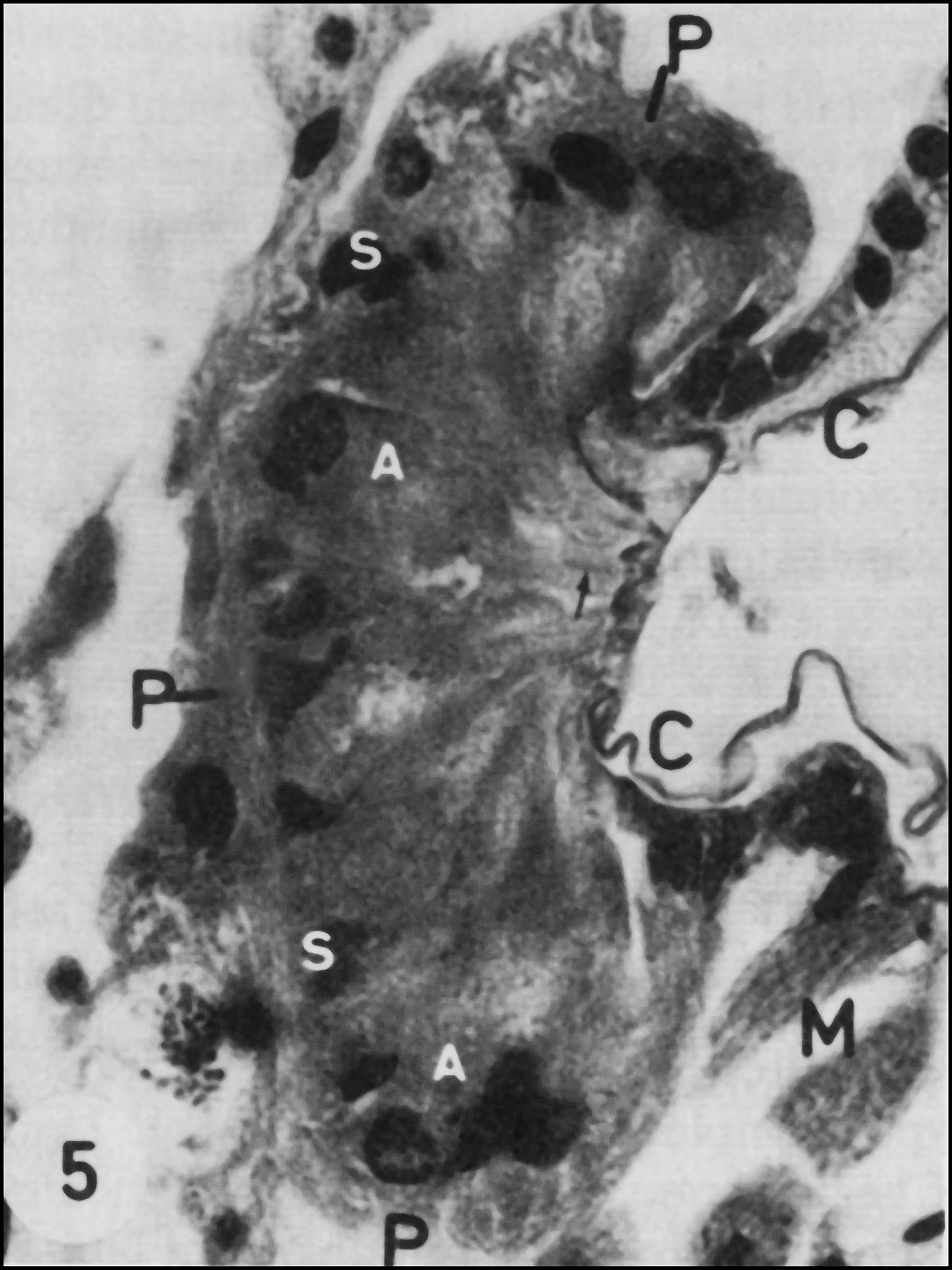 Uroctea durandi, organe pharyngien dit "du gout", coupe histologique, avec ses cellules glandulaires (adénocytes).